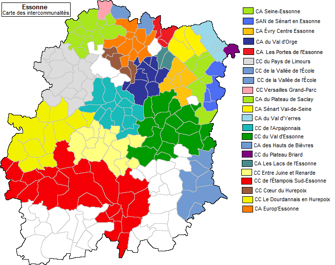 Carte des intercommunalités en Essonne en 2009.